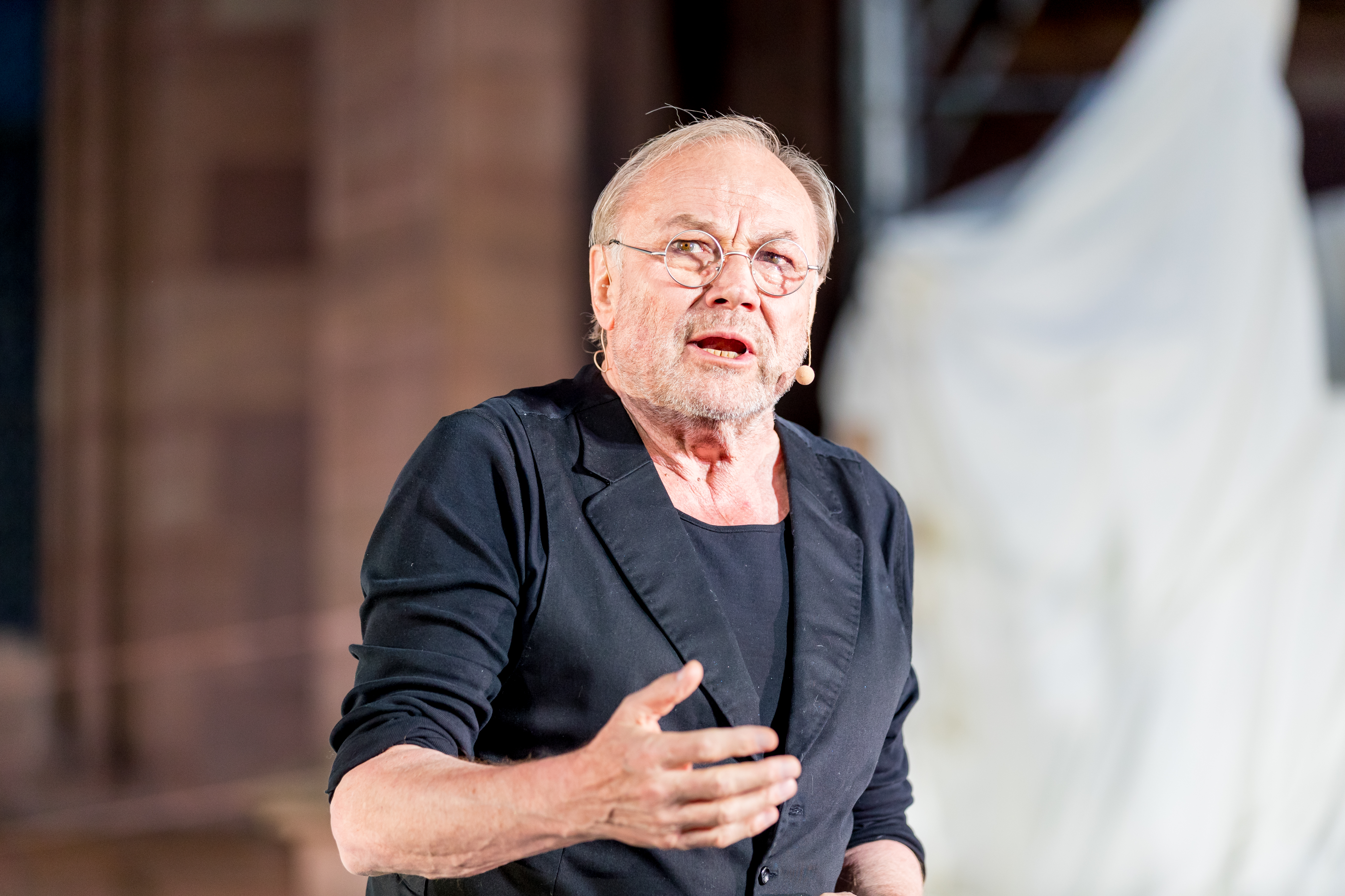 Klaus Maria Brandauer during Nibelungenfestspiele ( at Worms, Rheinland-Pfalz, Germany on 2019-07-10, Photo: Sven Mandel